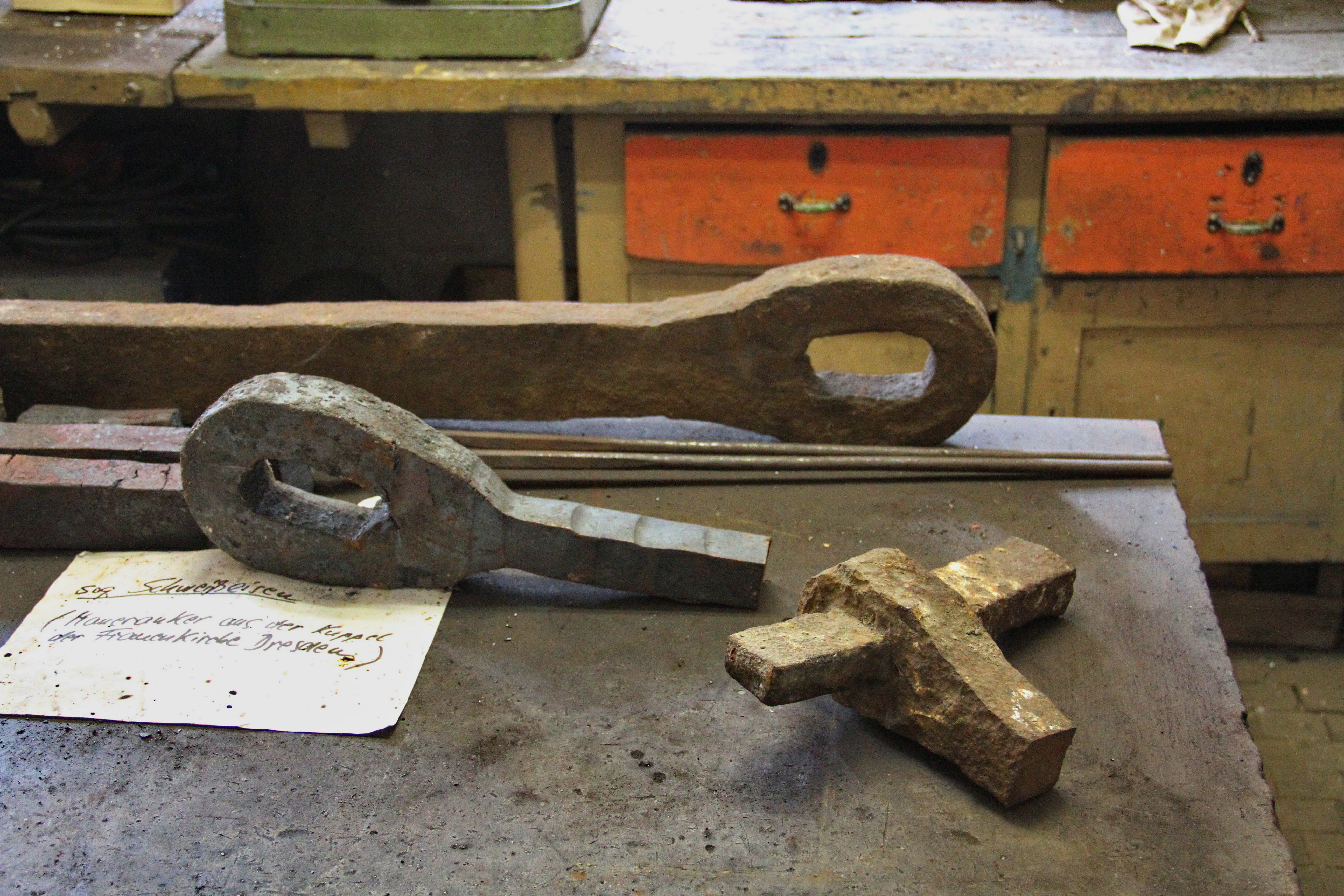 Hammerwerk Freibergsdorfer Hammer in Freiberg: Schweißeisen, Maueranker aus der Kuppel der Frauenkirche Dresden